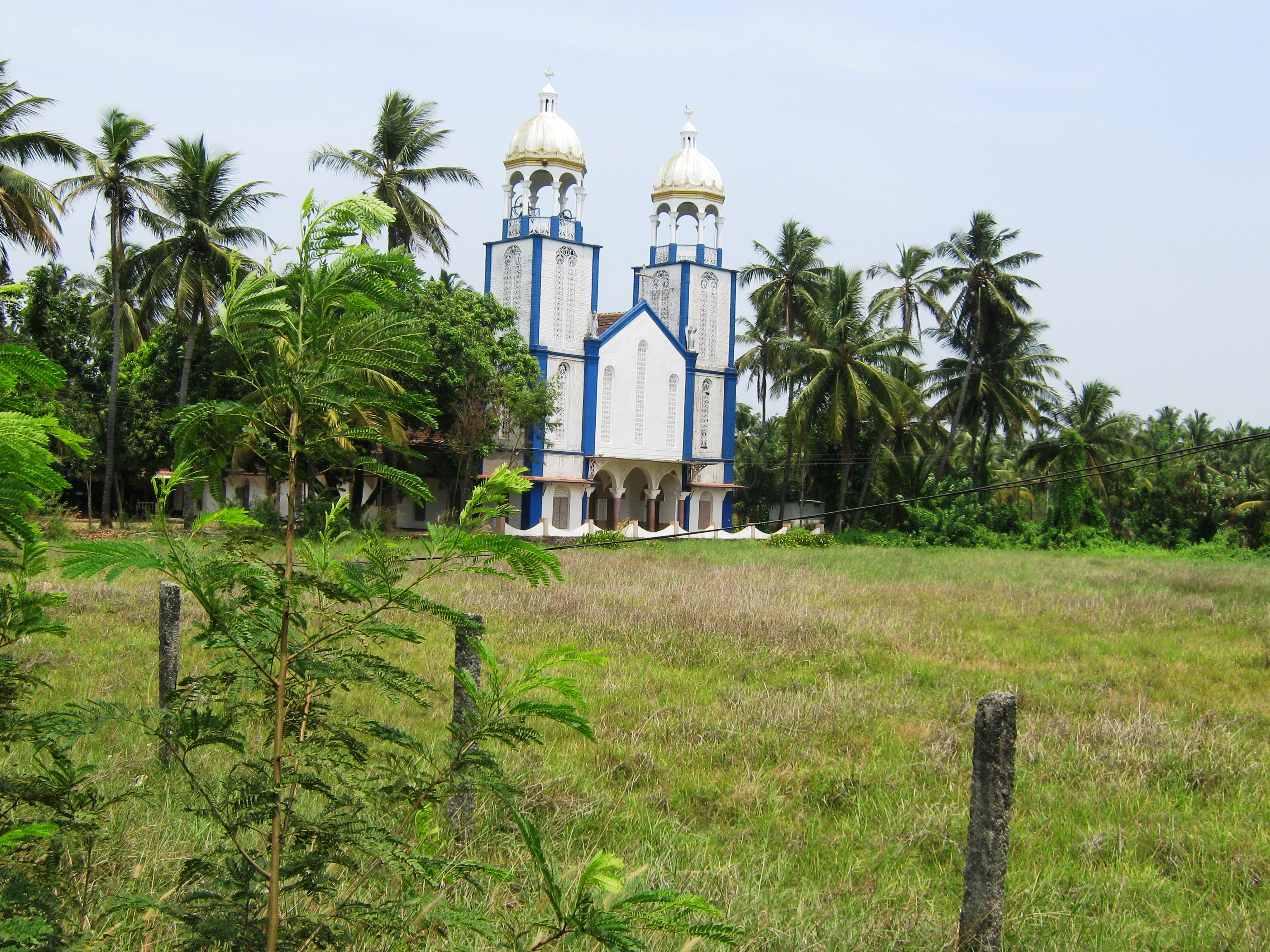 Fathima Church Thavam, Payangadi, India.